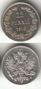 Russia Finland silver 1917